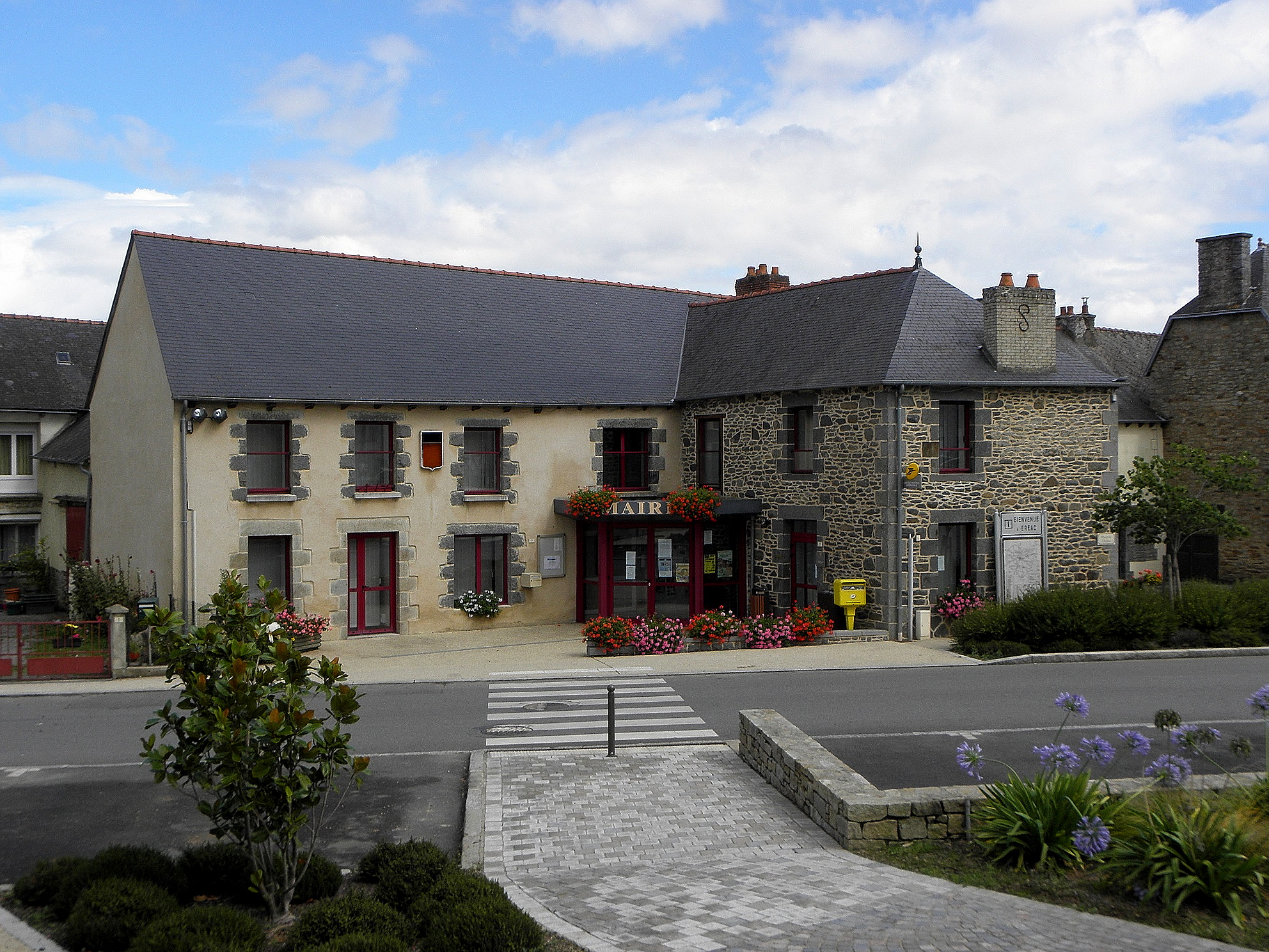 Nouvelle mairie d'Éréac (22).